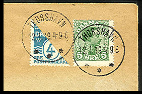 Вырезка из почтового конверта, отправленного из Торсхавна в 1919 году, франкированного разрезанной маркой в 4 эре